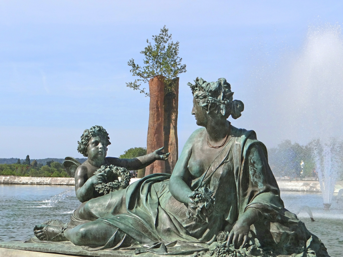 L'art contemporain en débat Nymphe et Zéphyr Parterre d'eau du château de Versailles Au fond, "TRA SCORZA E SCORZA / Entre écorce et écorce" œuvre de Giuseppe Penone 2003 Bronze, chêne "Ce qui m'intéresse, c'est quand le travail de l'homme commence à devenir nature" Giuseppe Penone. Exposition 'Penone Versailles'